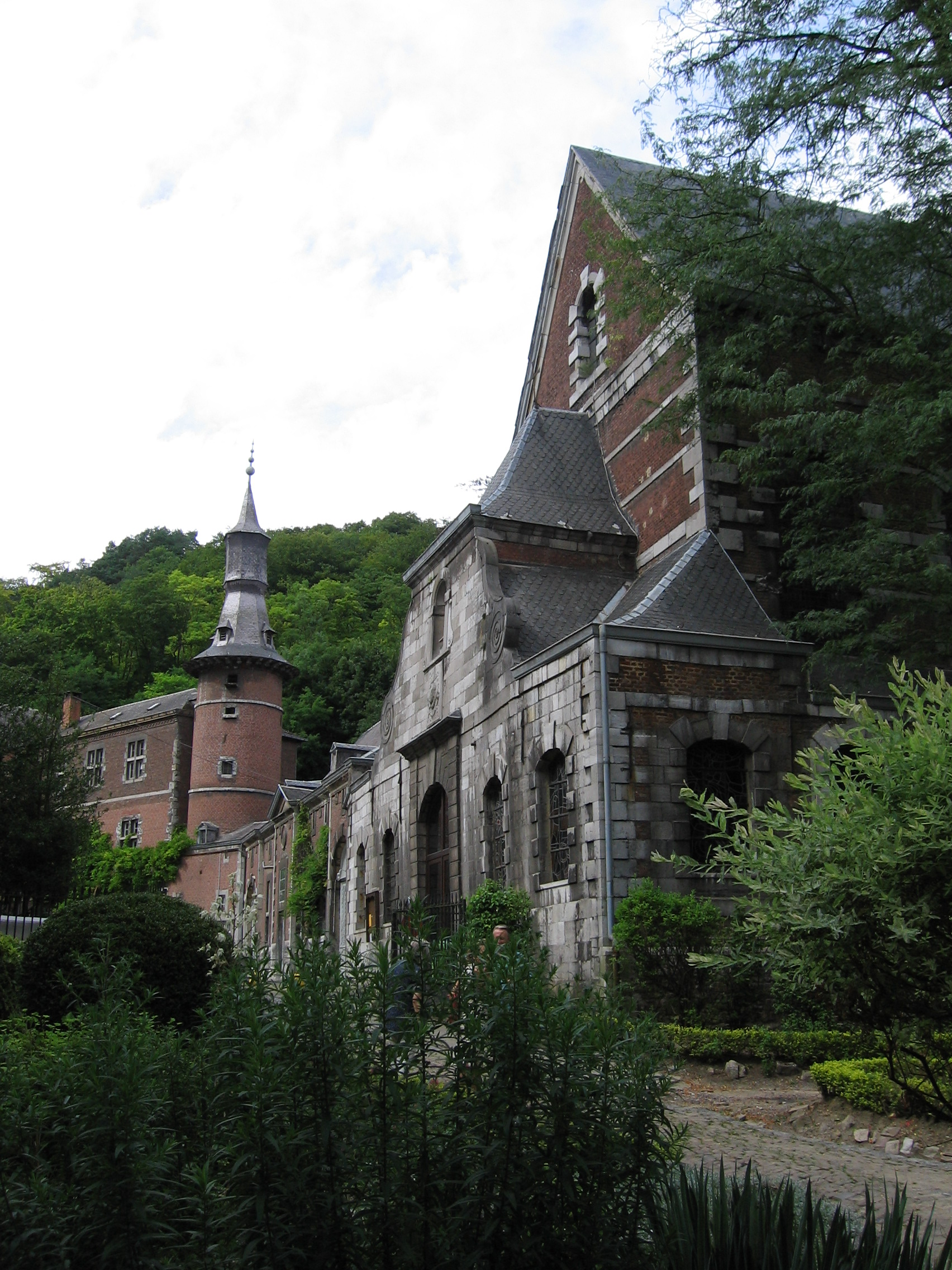 Eglise et colombier de l'ancienne abbaye augustinienne de Flône, Amay, Belgique